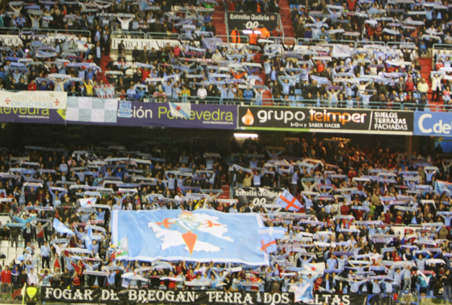 Seareiros do Celta no partido Celta-Dépor do 27 de outubro do 2012.